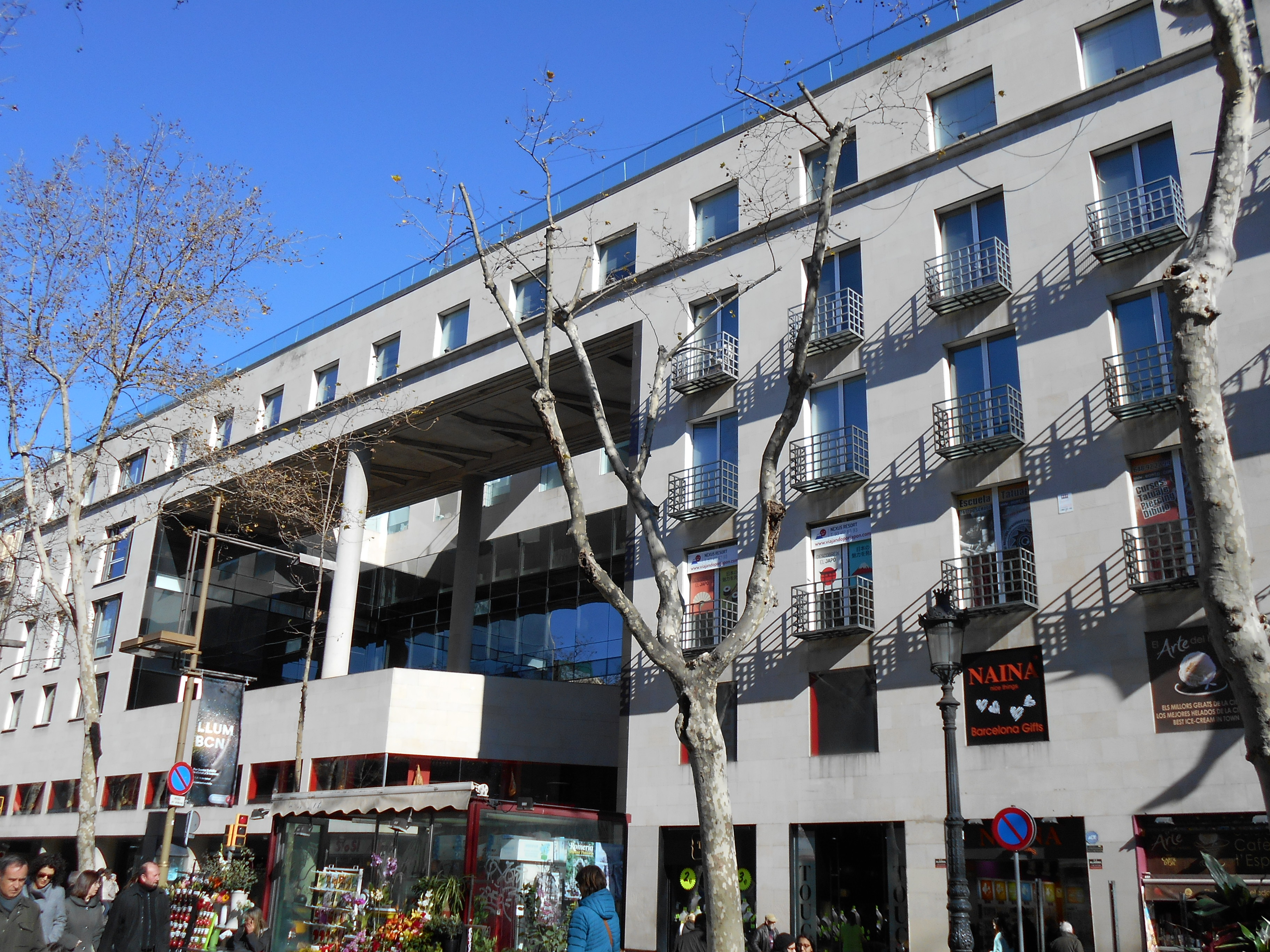 Edificio Palau Nou de la Rambla (1990-1993), de Martorell-Bohigas-McKay, Carles Buxadé y Joan Margarit.